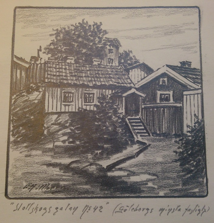 Kolteckning av Einar Hillberg föreställande Slottsskogsgatan nr 42 i Göteborg